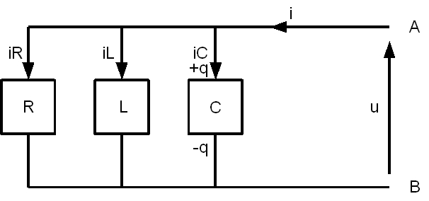 Schéma d'un circuit RLC parallèle